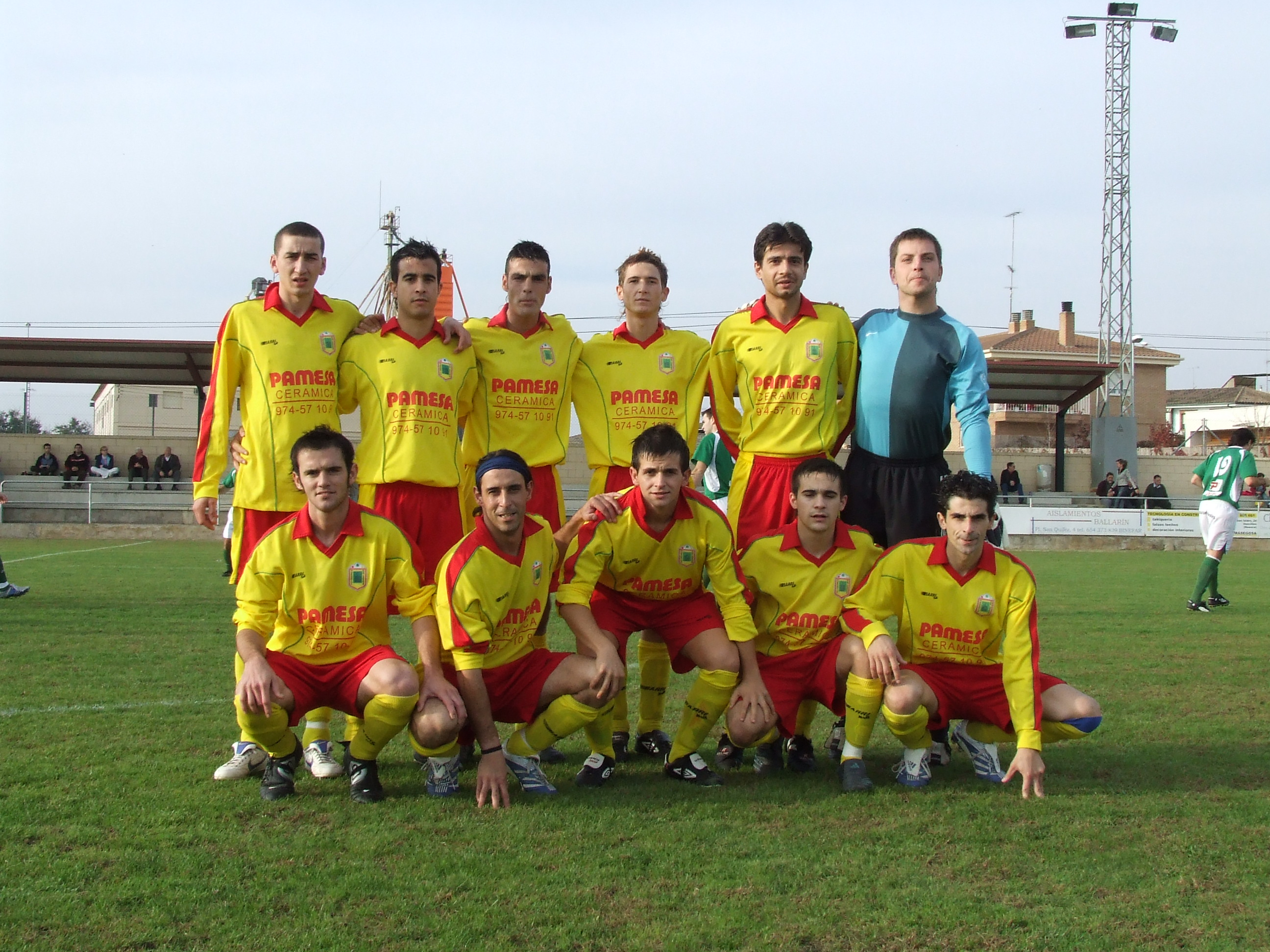 UD San Lorenzo de Flumen